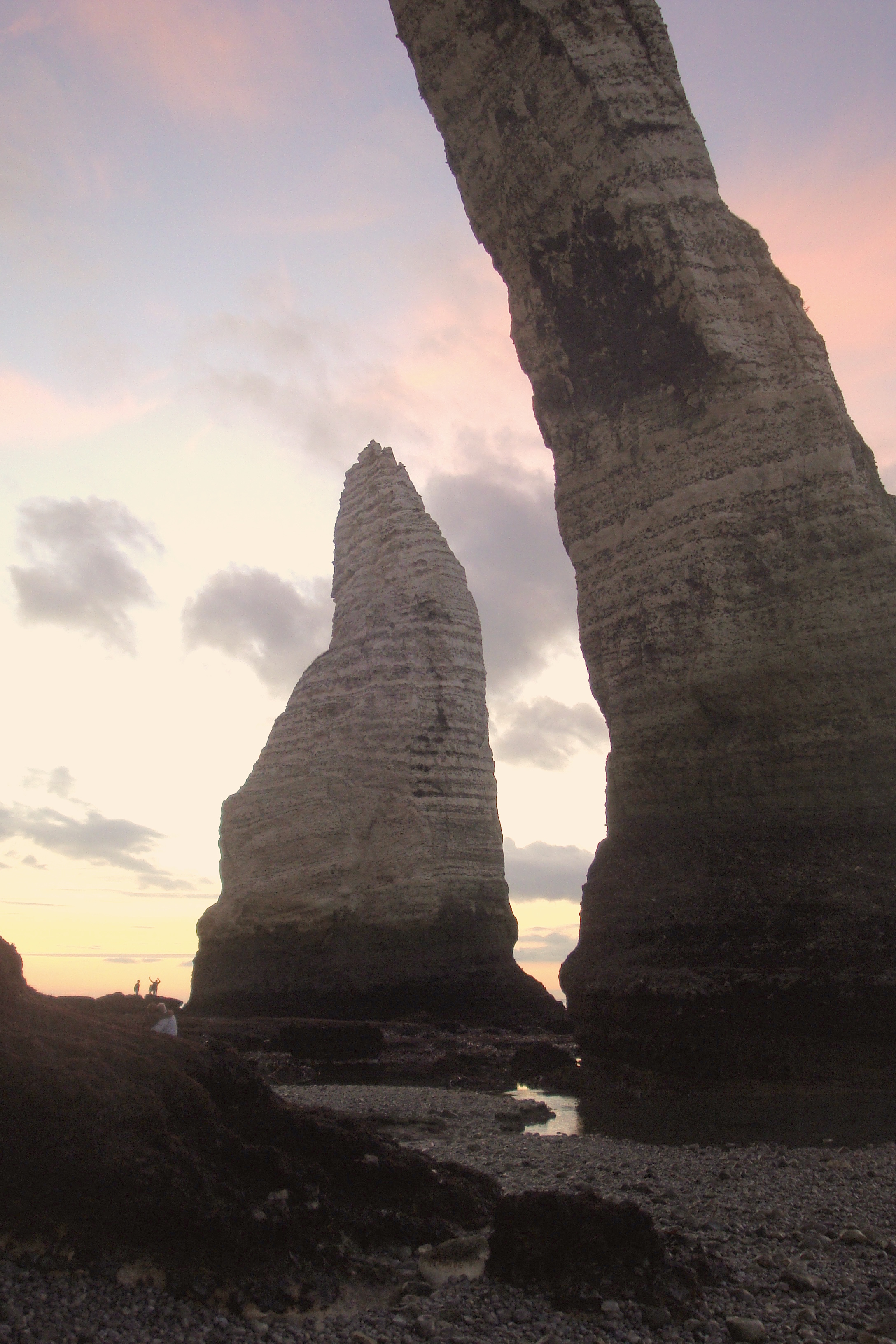 Très grande marée sous la grande arche à Etretat